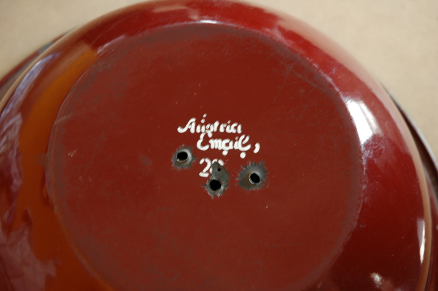 Email-Topf/Schüssel der "Austria Email". Fotografiert an der Landesausstellung in Ampflwang, Oberösterreich